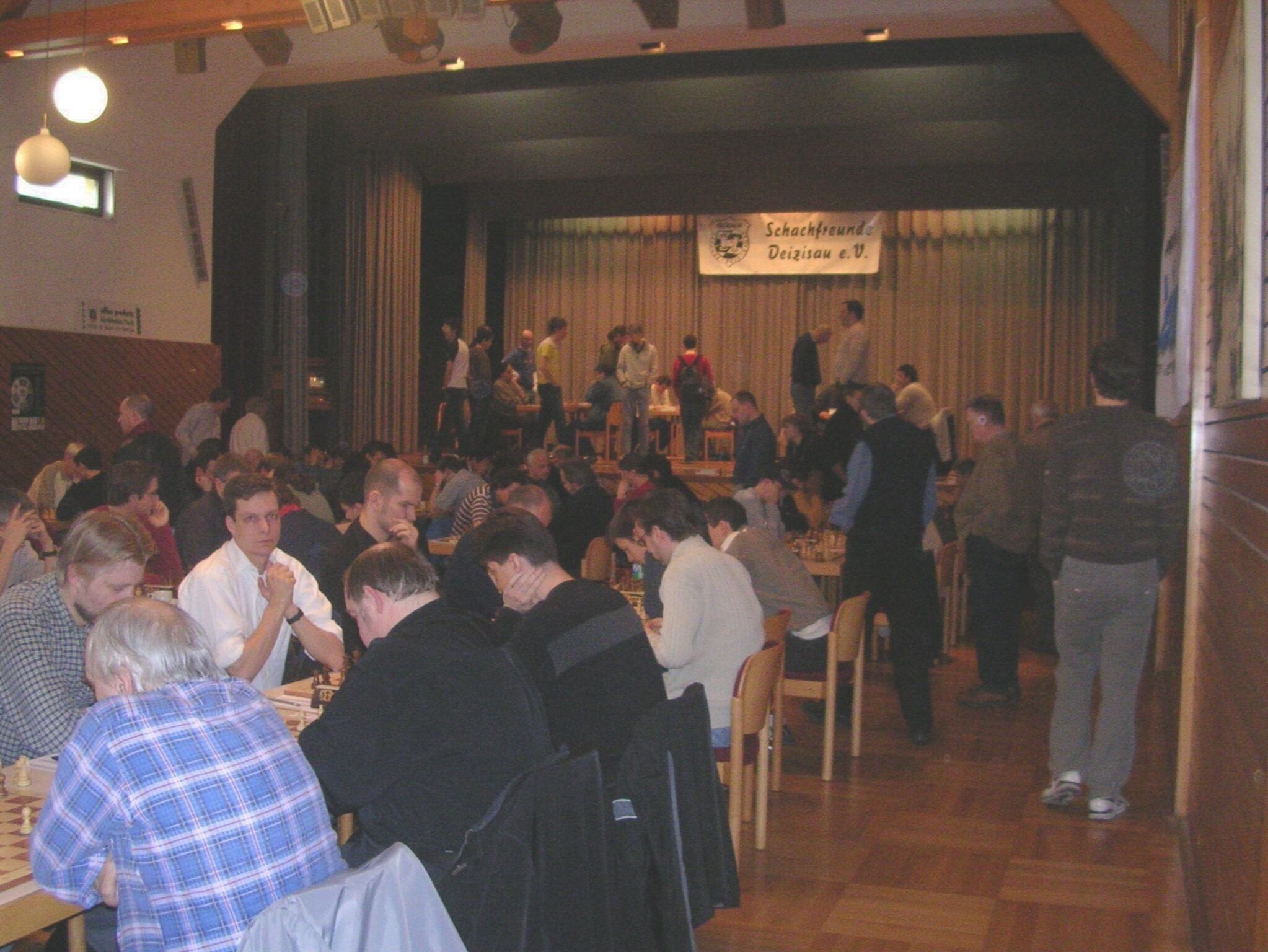 Chess Tournament: Neckar-Open 2006 in Deizisau (Germany)